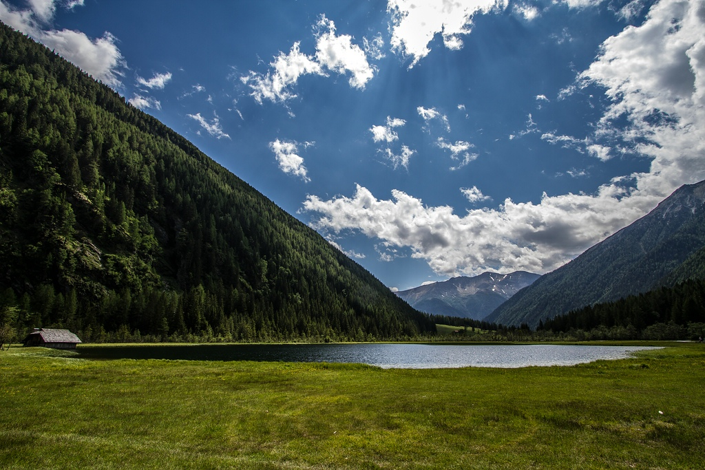 Im Seebachtal: Blick auf den Stappitzer See in Richtung Mallnitz